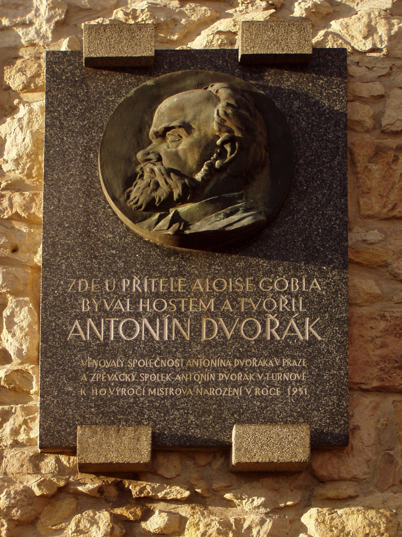 Pamětní deska Antonína Dvořáka na bývalé konírně zámku Sychrov